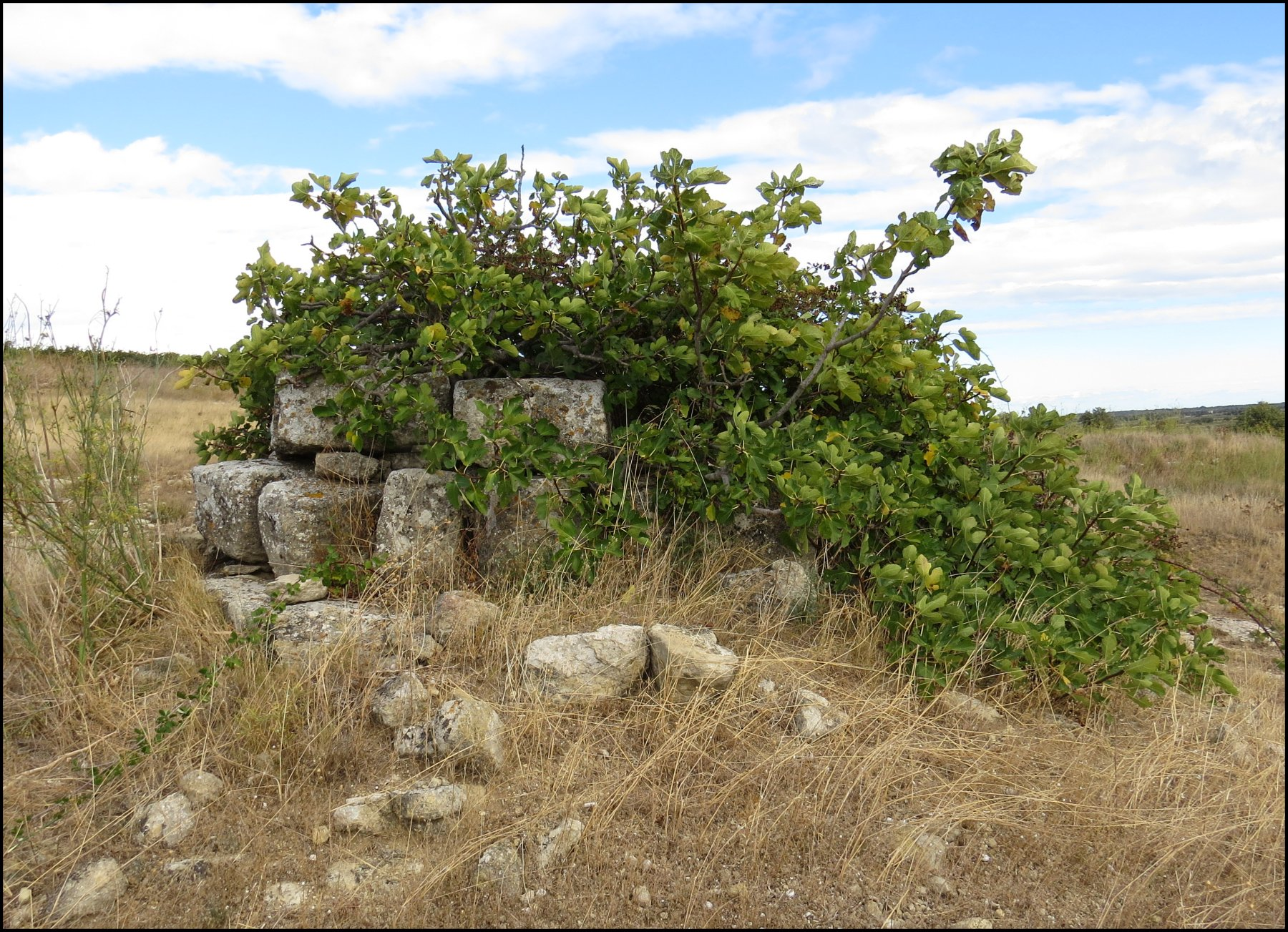 Vue d'ensemble d'un puits, peut-être antique et occupé par un figuier. Près des carrières de Gouldeau, Lespignan, Occitanie